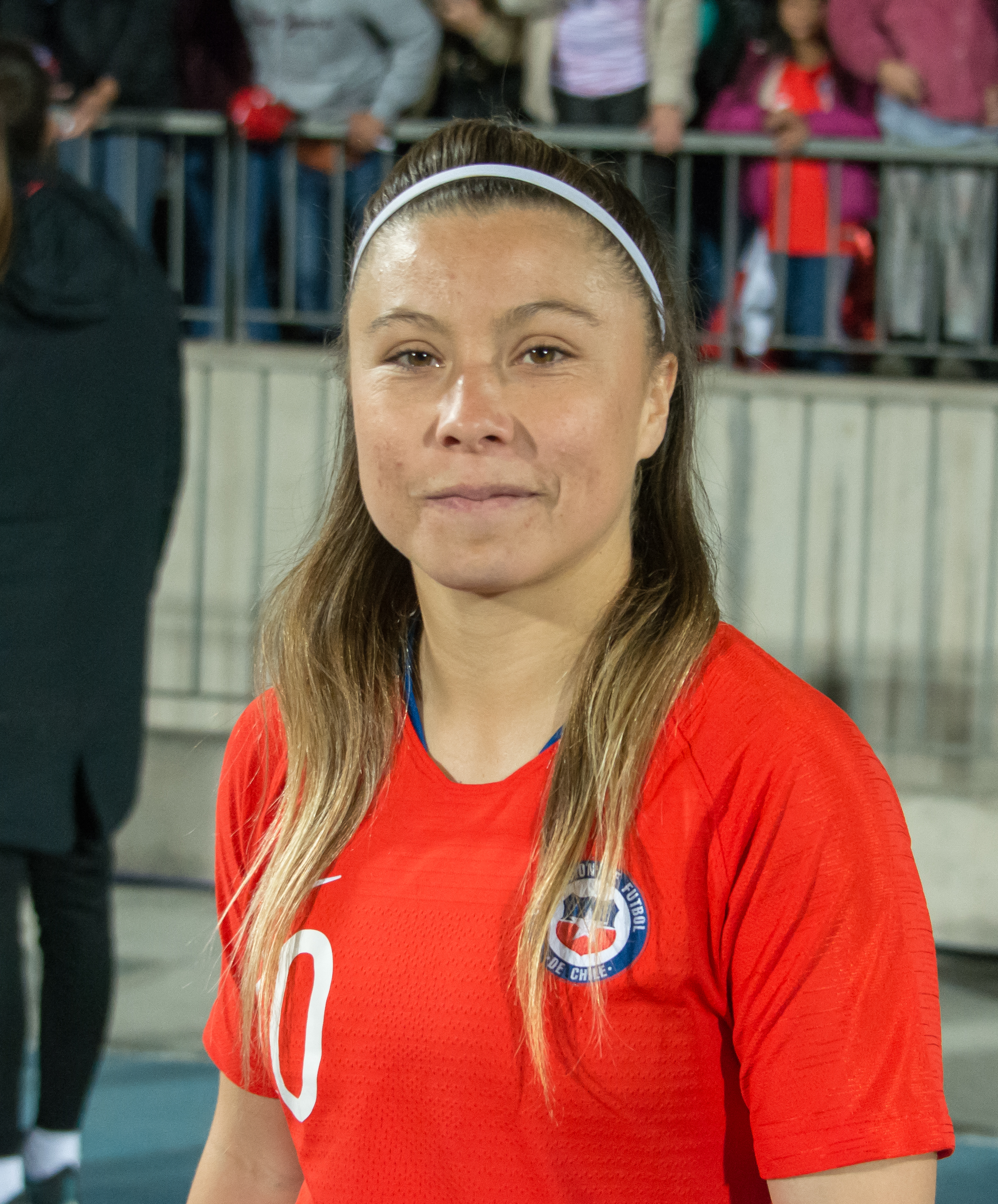 Yanara Aedo,casado Chile v Colombia, Estadio Nacional, Ñuñoa, Santiago, Chile.